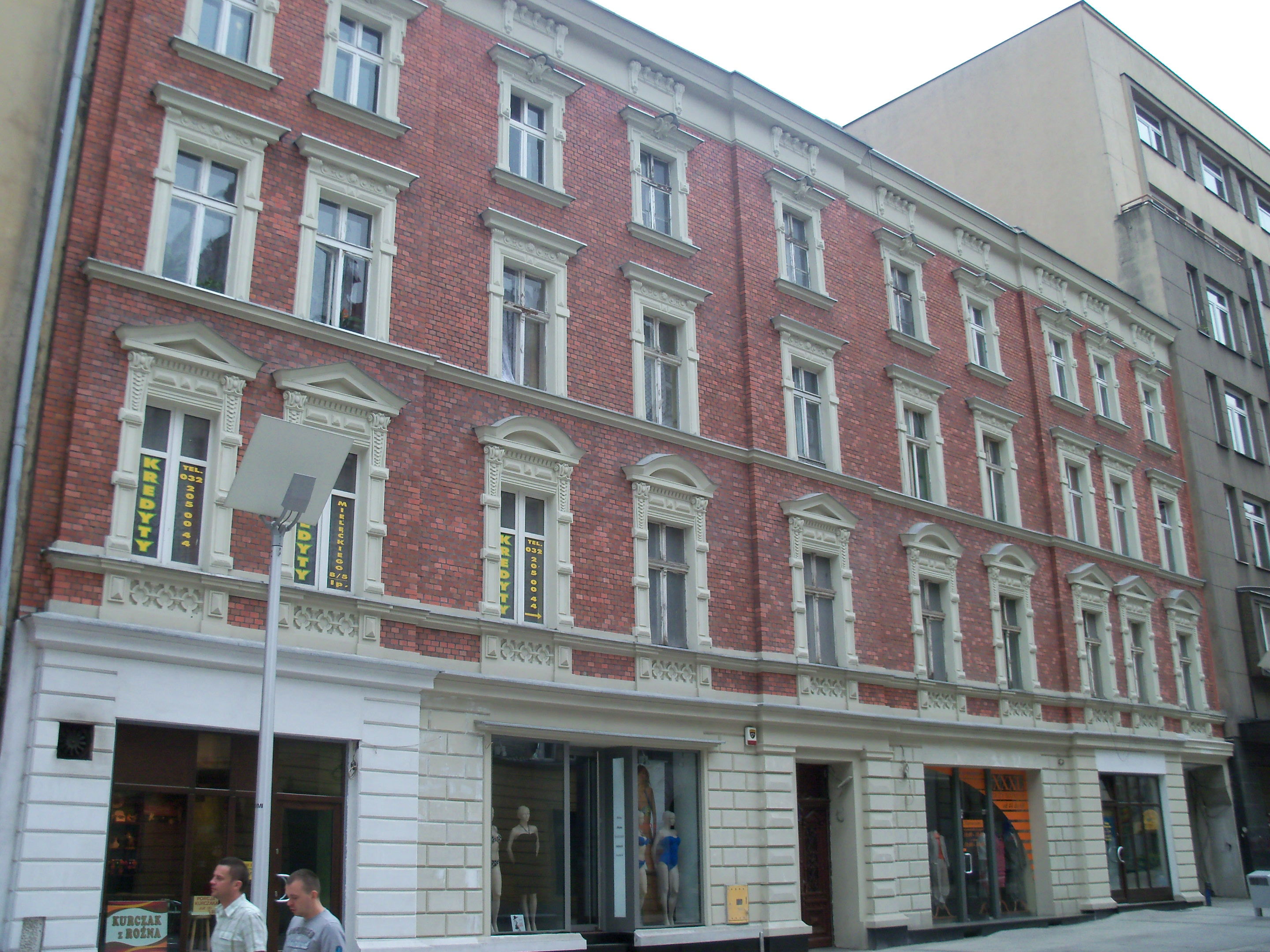 Katowice, ul. A. Mielęckiego 8 - kamienica